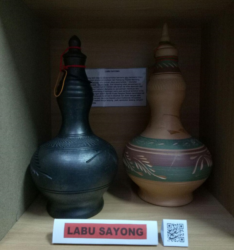 labu sayong